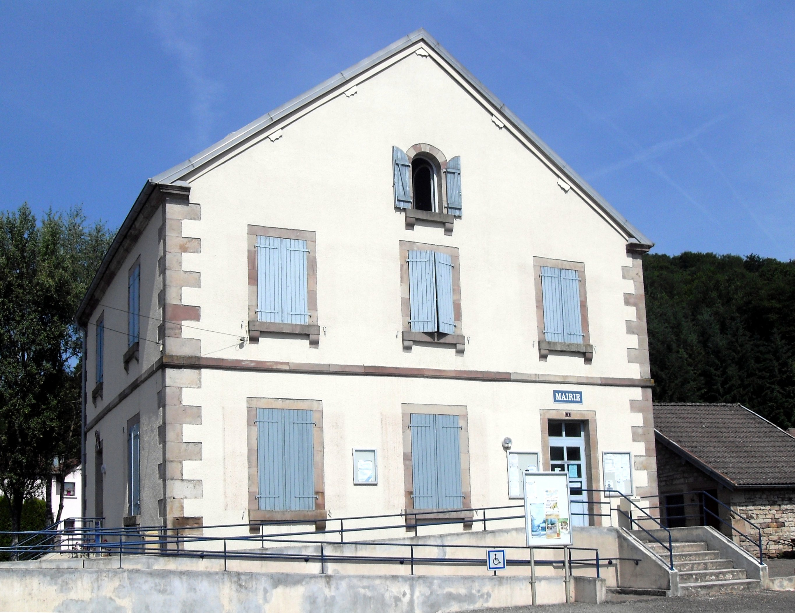 La mairie d'Amage